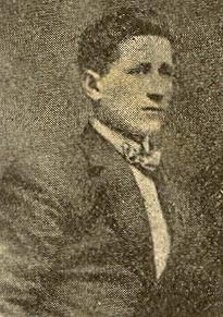 Vasil Ivanov